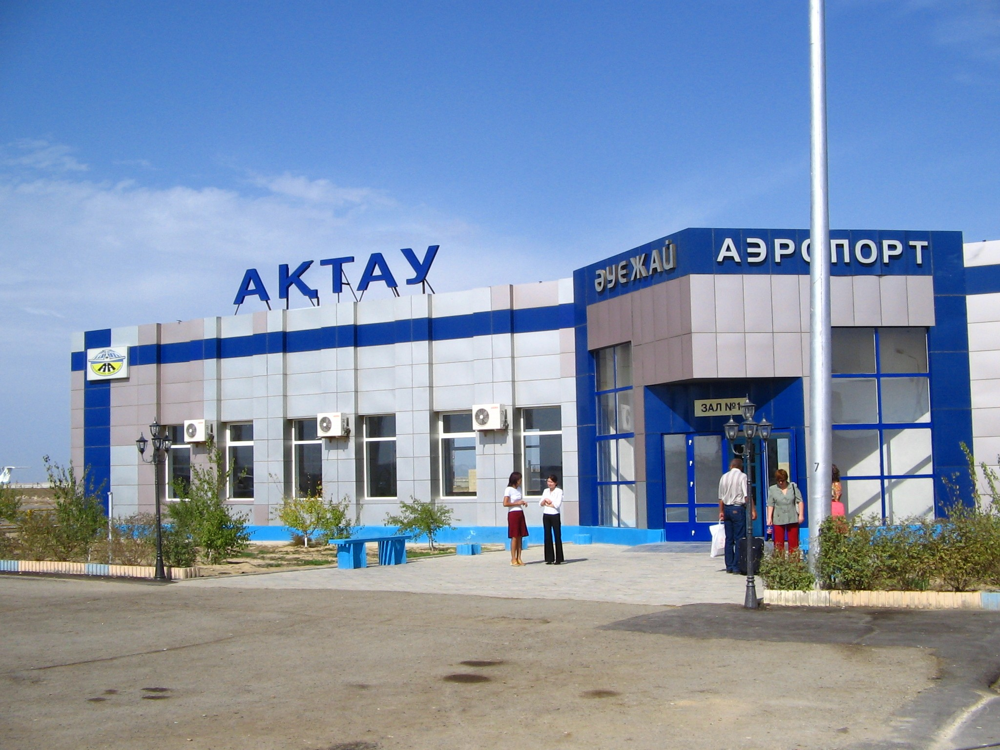 Аэропорт Актау